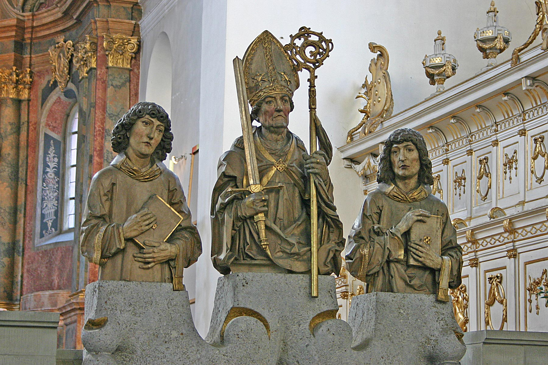 Kilian, Kolonat, Totnan - Schutzpatronen der Franken, Kopien der Riemenschneider-Holzfiguren von Heinz Schiestl in der Neumünster-Kirche, Würzburg